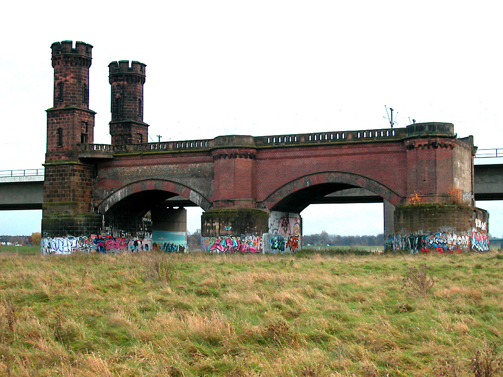 Alt Eisenbann Brücke zwischen Neuss und Düsseldorf